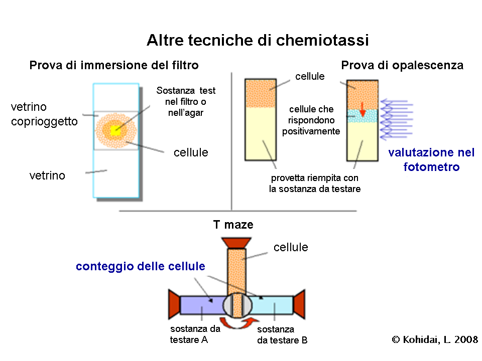 Altre tecniche di chemiotassi